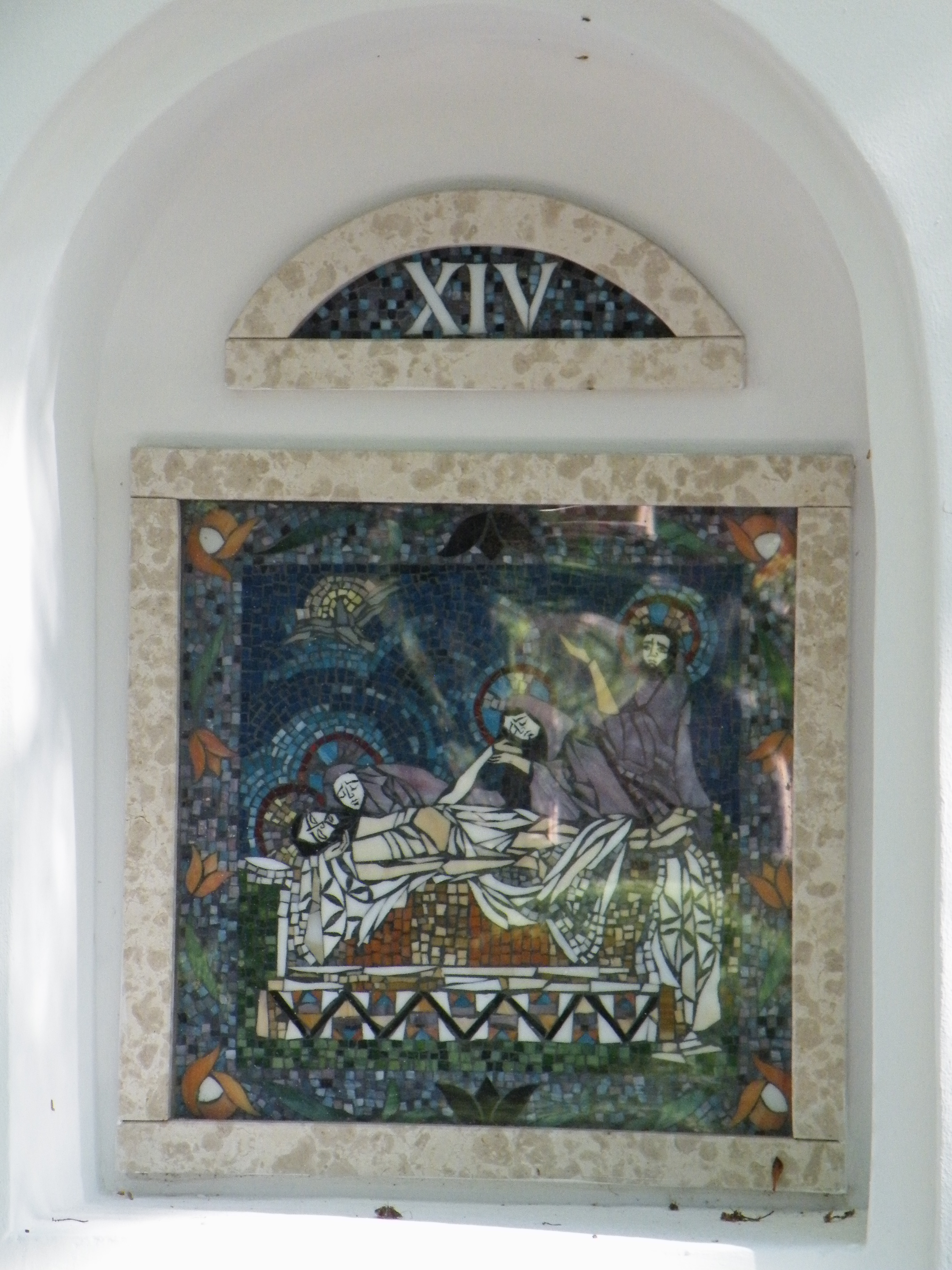 Stációk a Palóc ligetben, Balassagyarmaton